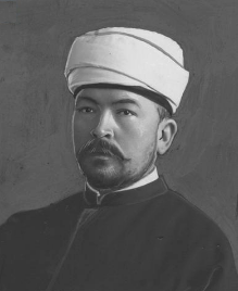 Jakub Szynkiewicz mufti Muzułmańskiego Związku Religijnego.